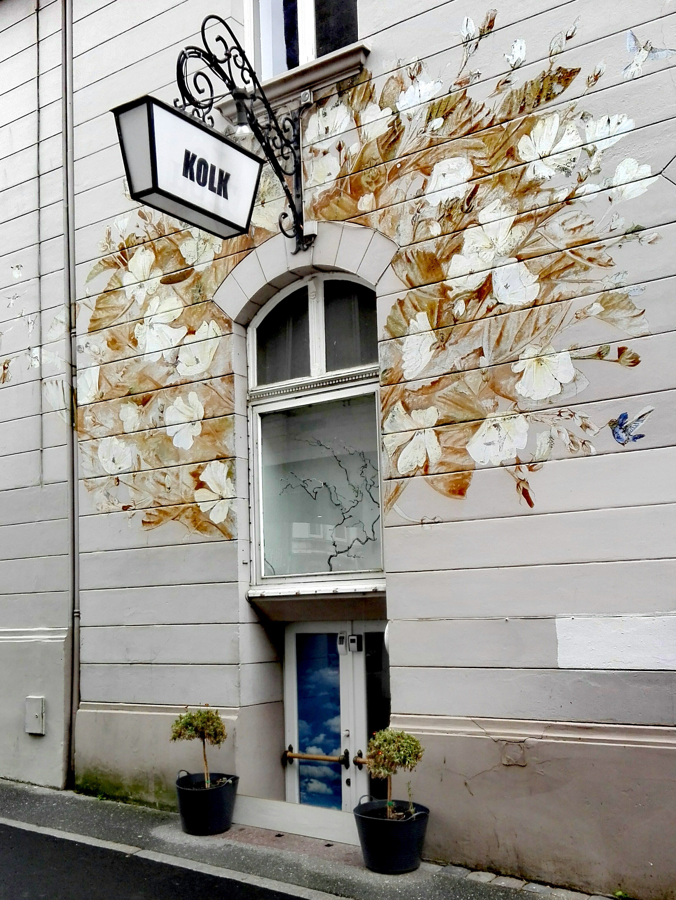 Lübeckisches Portal im Kolk.